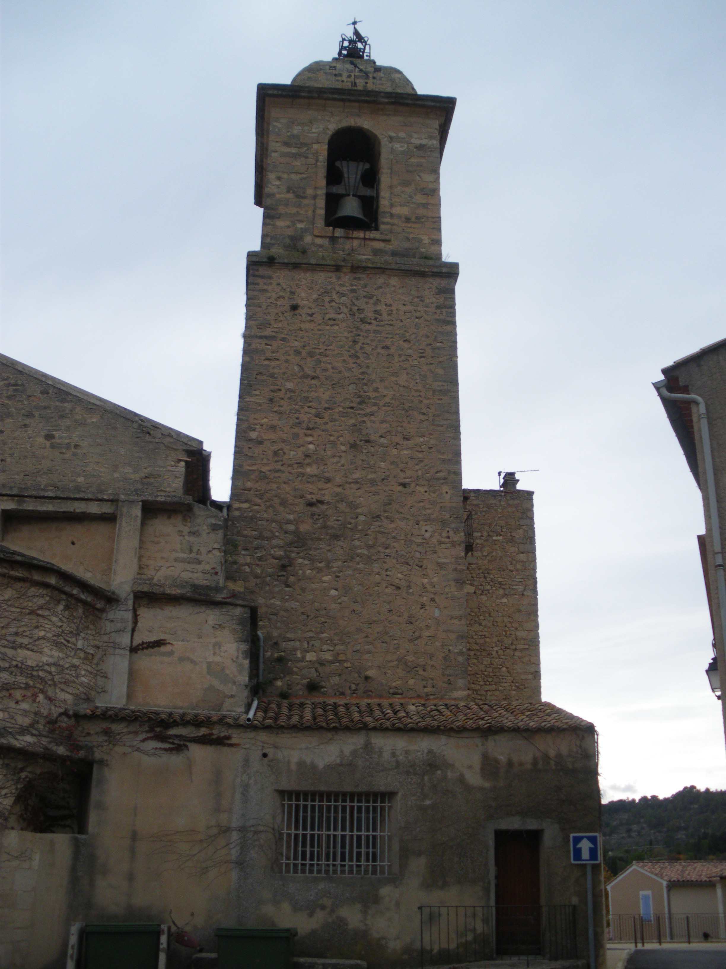 Clocher de l'église de Mormoiron